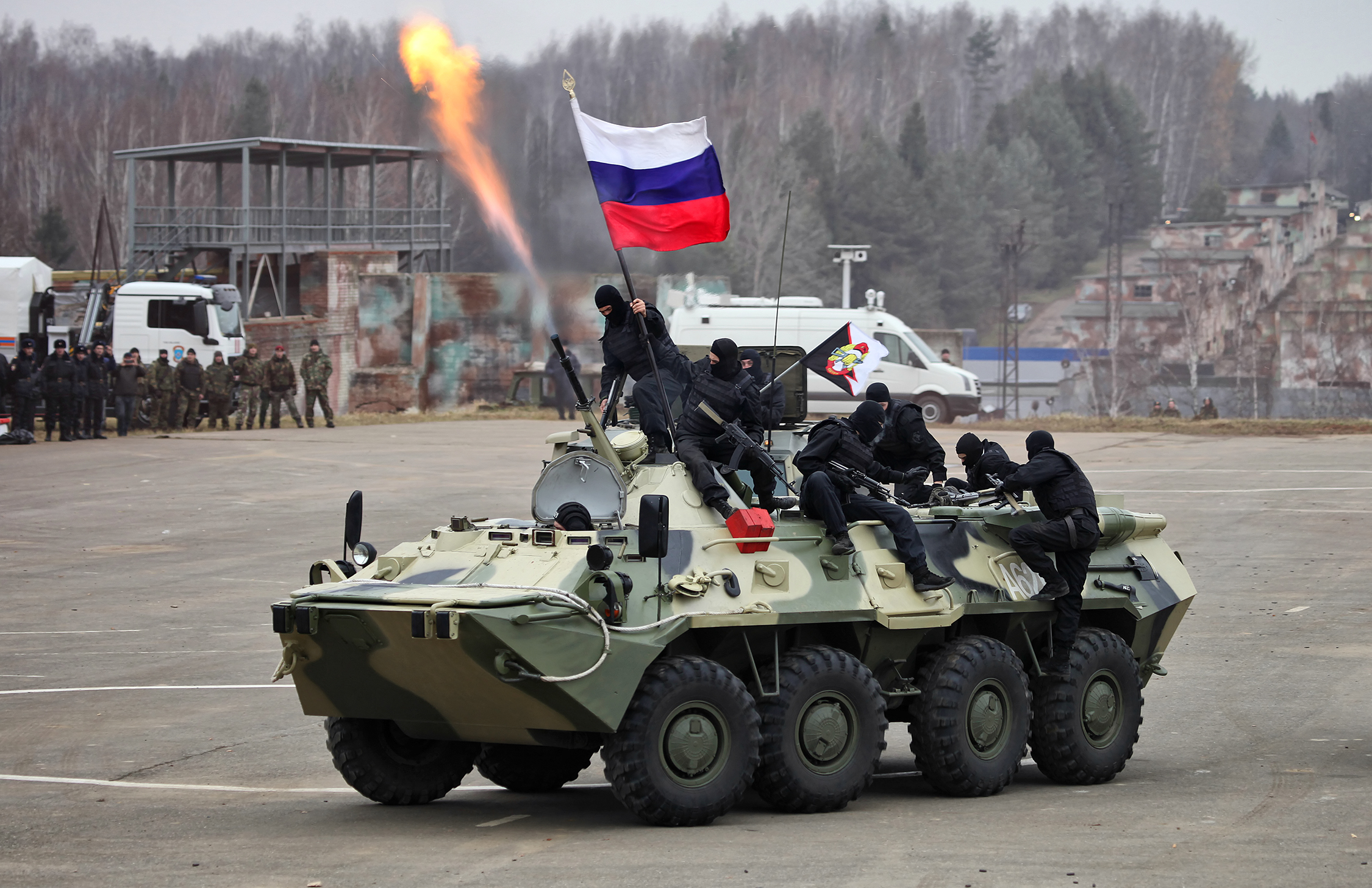 Военнослужащие 604-го центра специального назначения внутренних войск МВД России на крыше БТР-80 (Operators from 604th Special Purpose Center of Internal troops on the top of BTR-80)